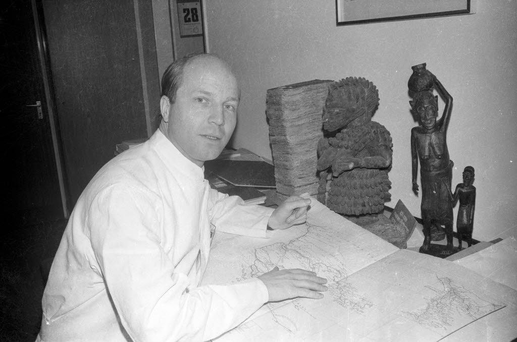 am Anthropologisches Institut der Christian-Albrechts-Universität (CAU).